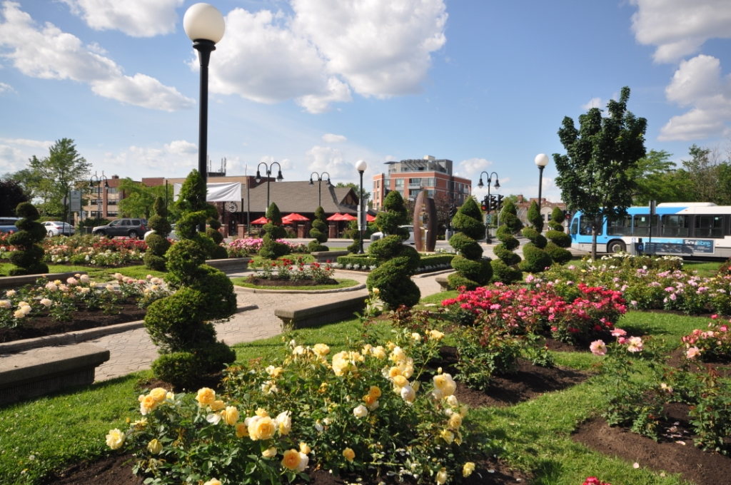 Park Connaughta_22June2015_2